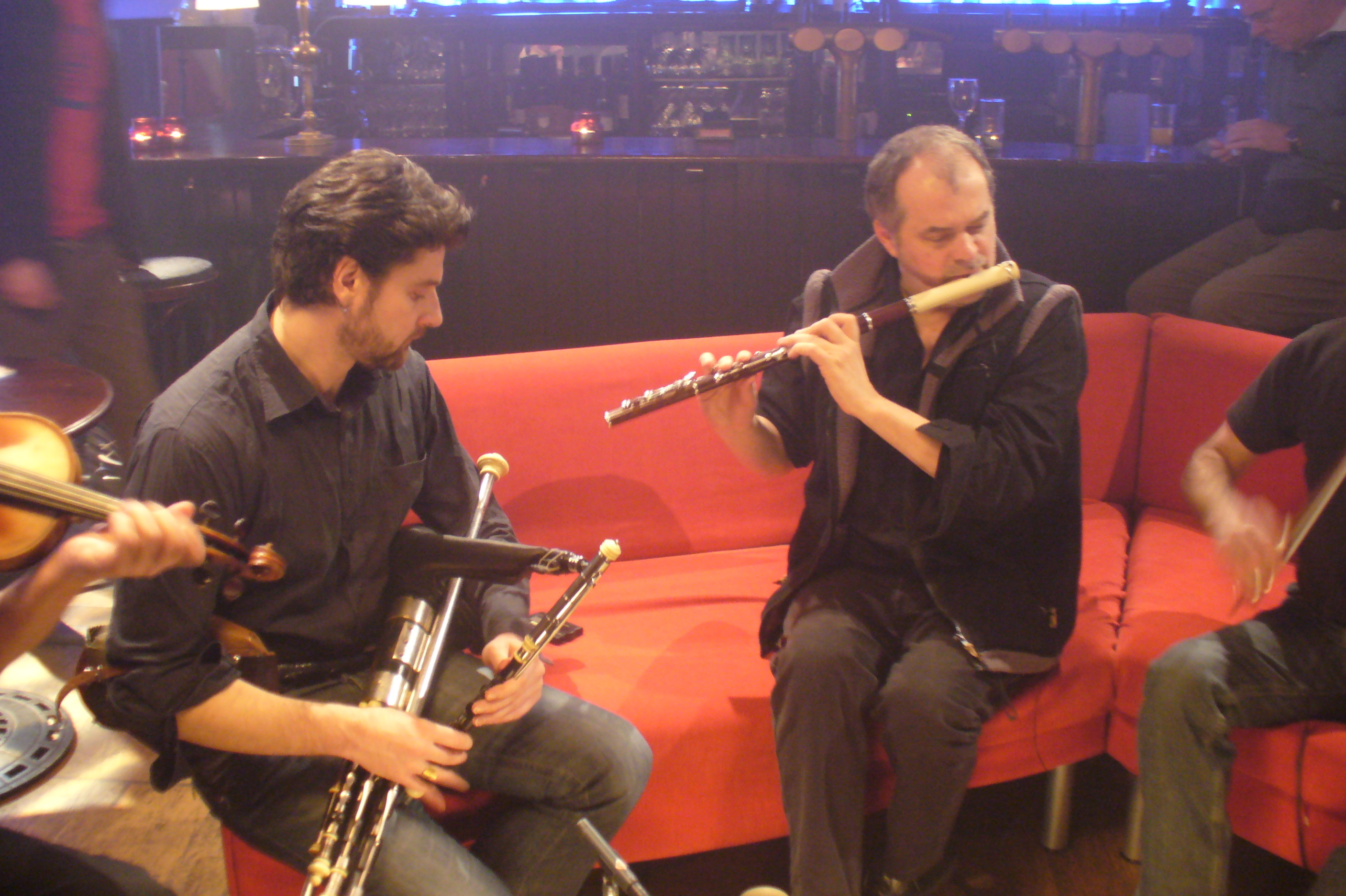 Ronan Le Bars et Jean-Michel Veillon du groupe Pennoù Skoulm sur la chaine de télévision écossaise BBC Alba en 2010.